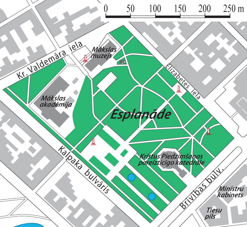 Plan der Parkanlage Esplanade in Riga